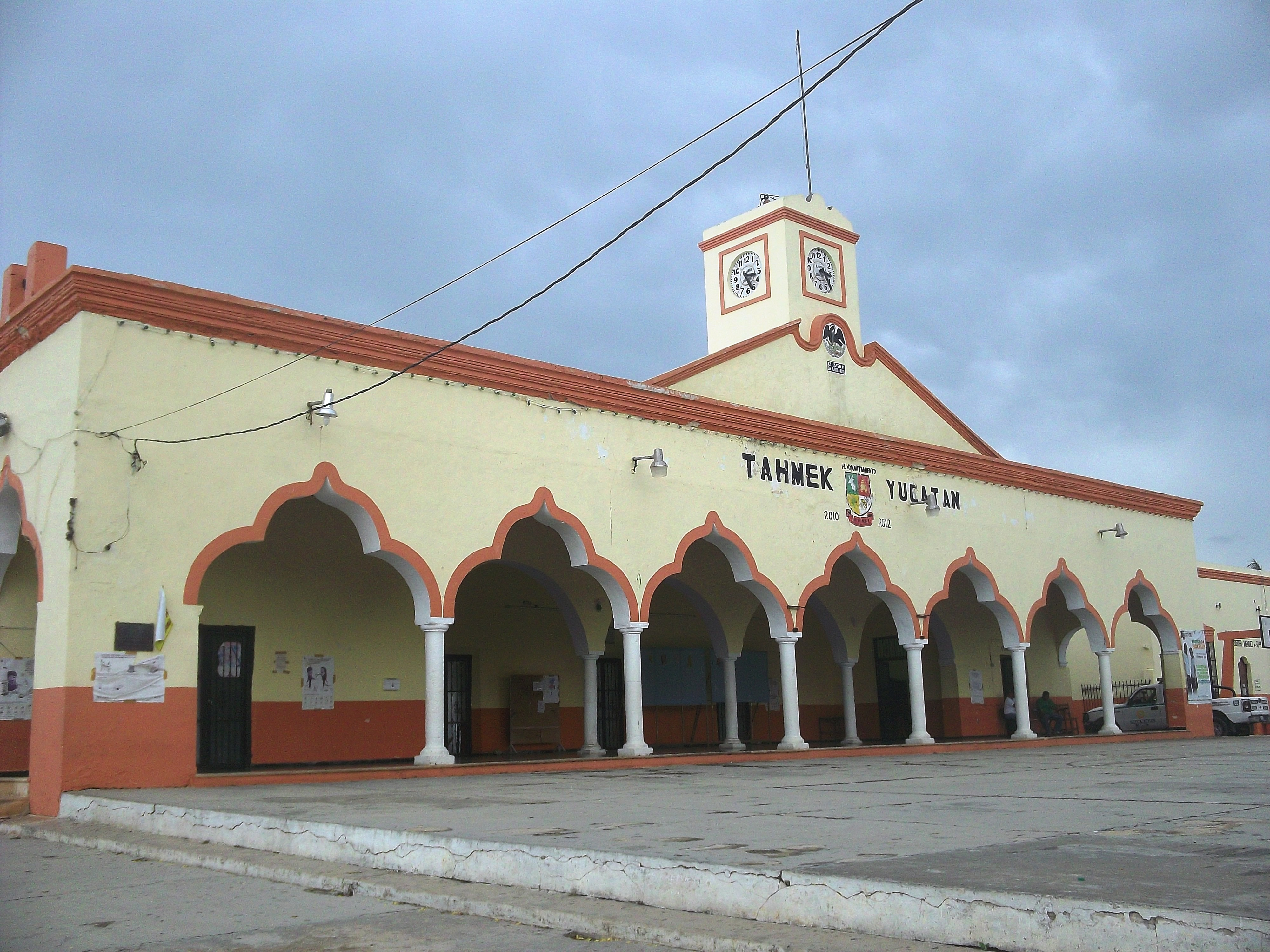 Palacio municipal de Tahmek, Yucatán.